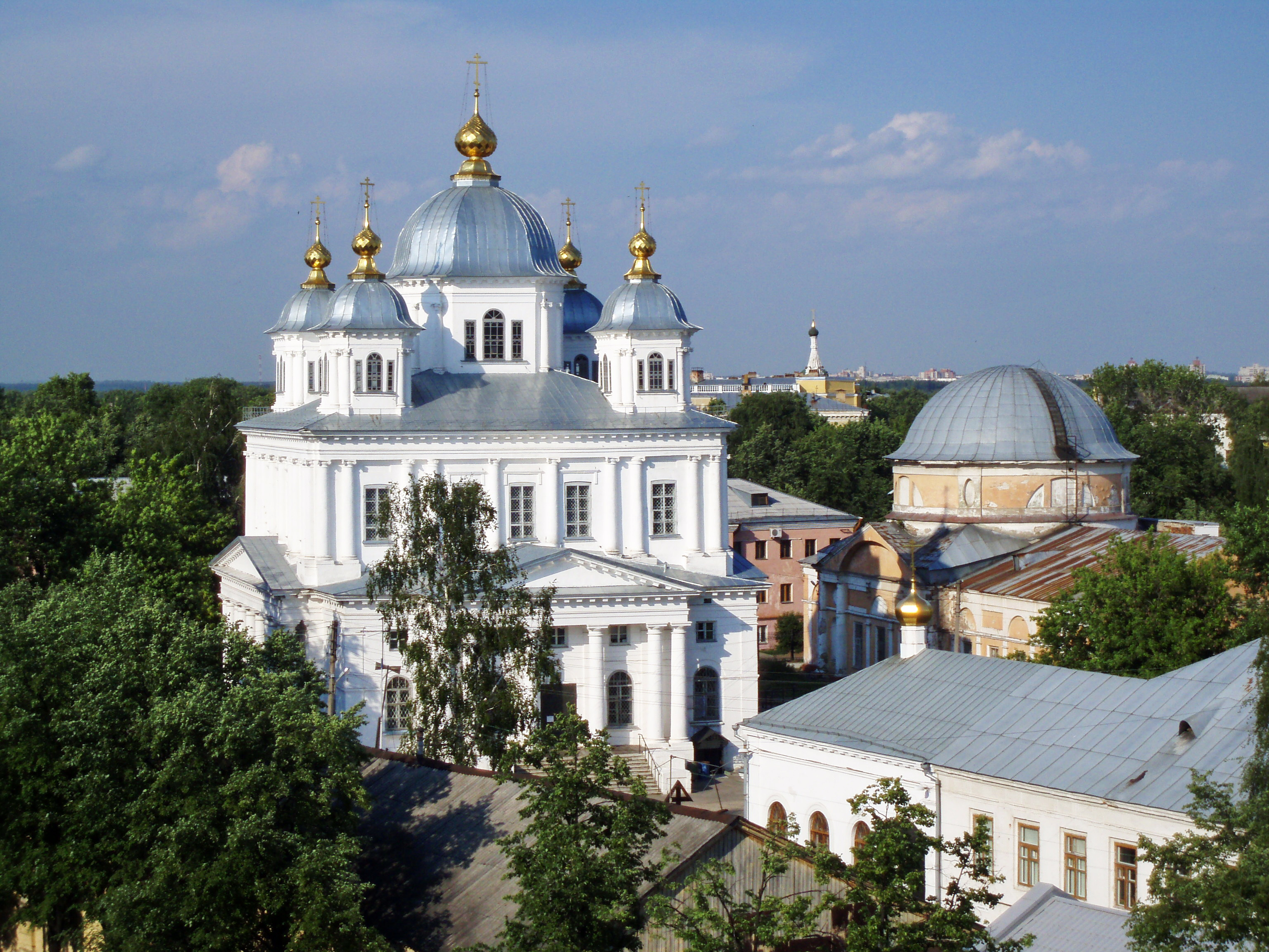 Монастырь Казанский (Ярославская область, Ярославль, Первомайская улица, 19, 19-а, Трефолева улица, 20)